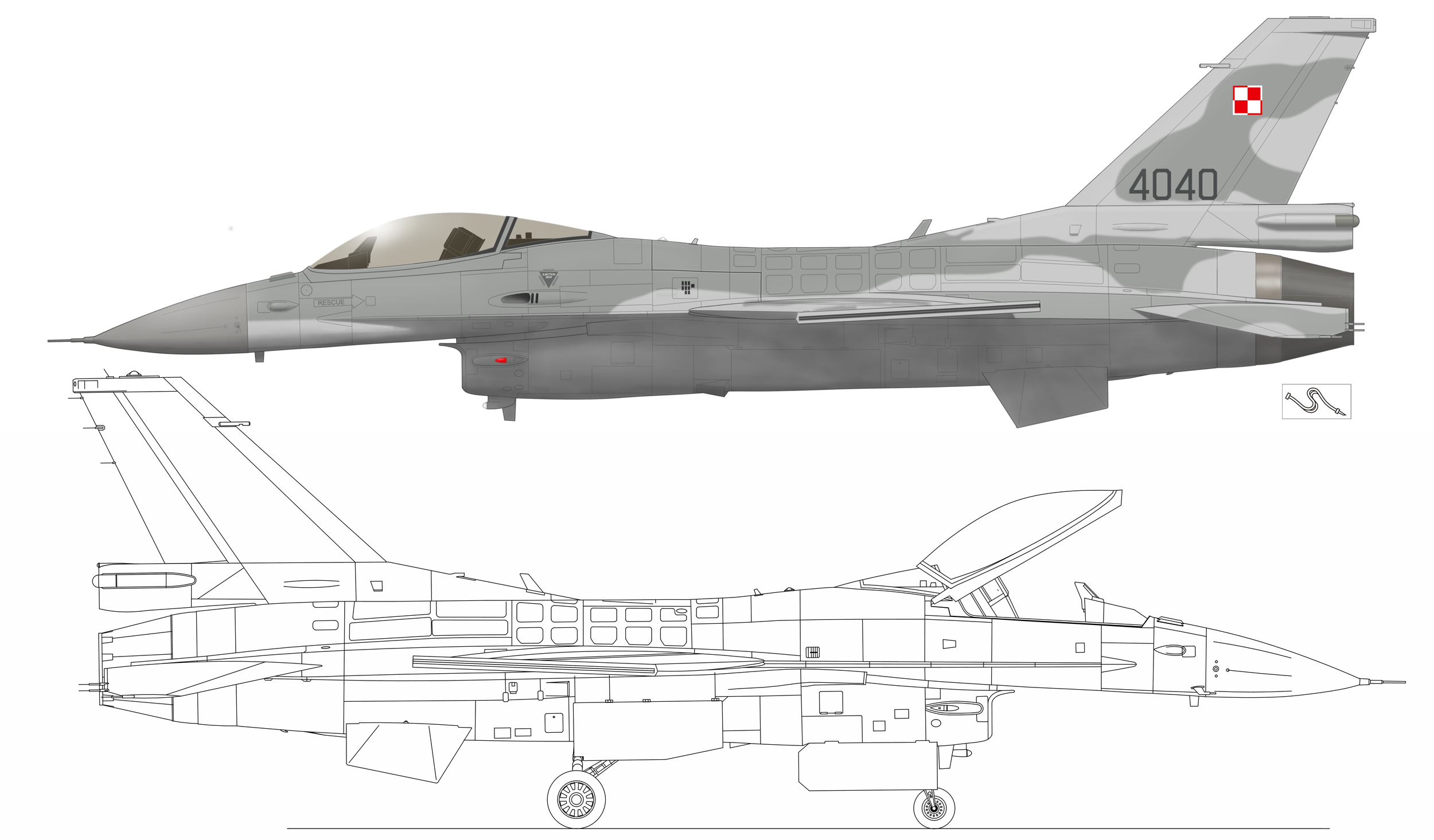 F-16